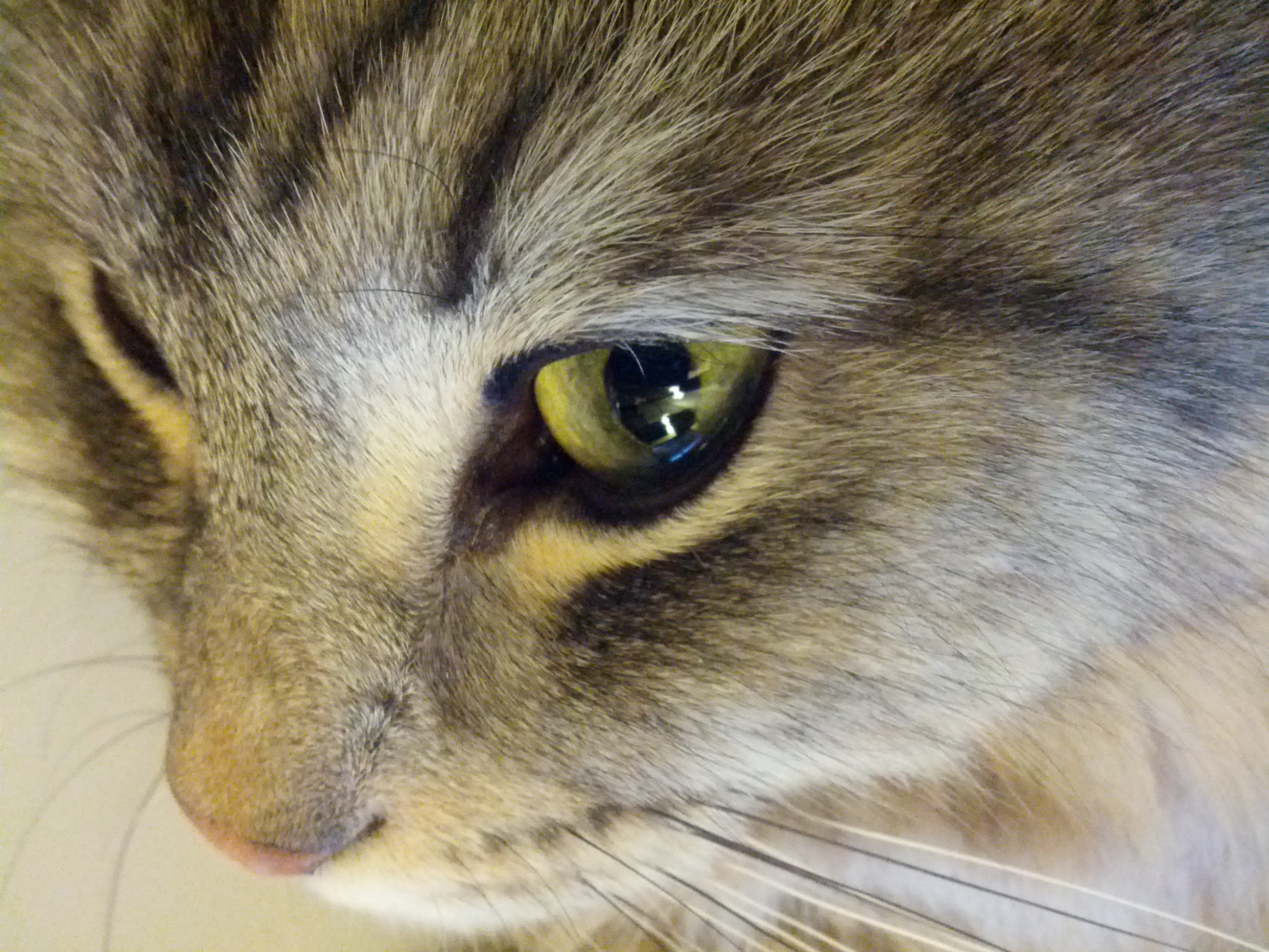 "Дикий" зеленый цвет глаз